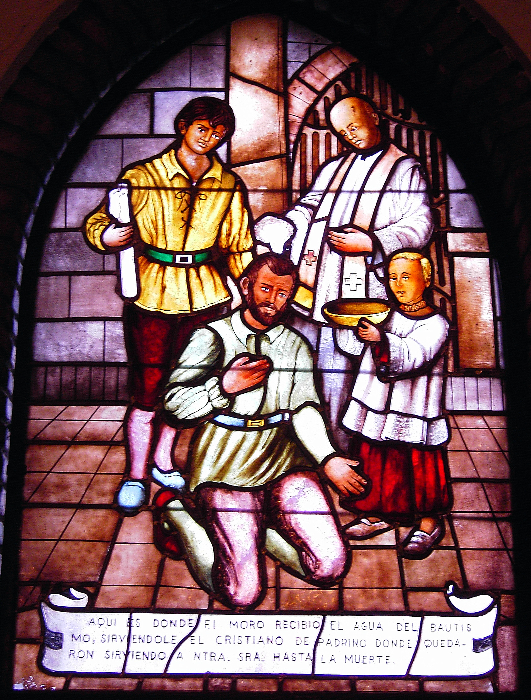 Detalle cristalería Ermita de la Cinta de Huelva.